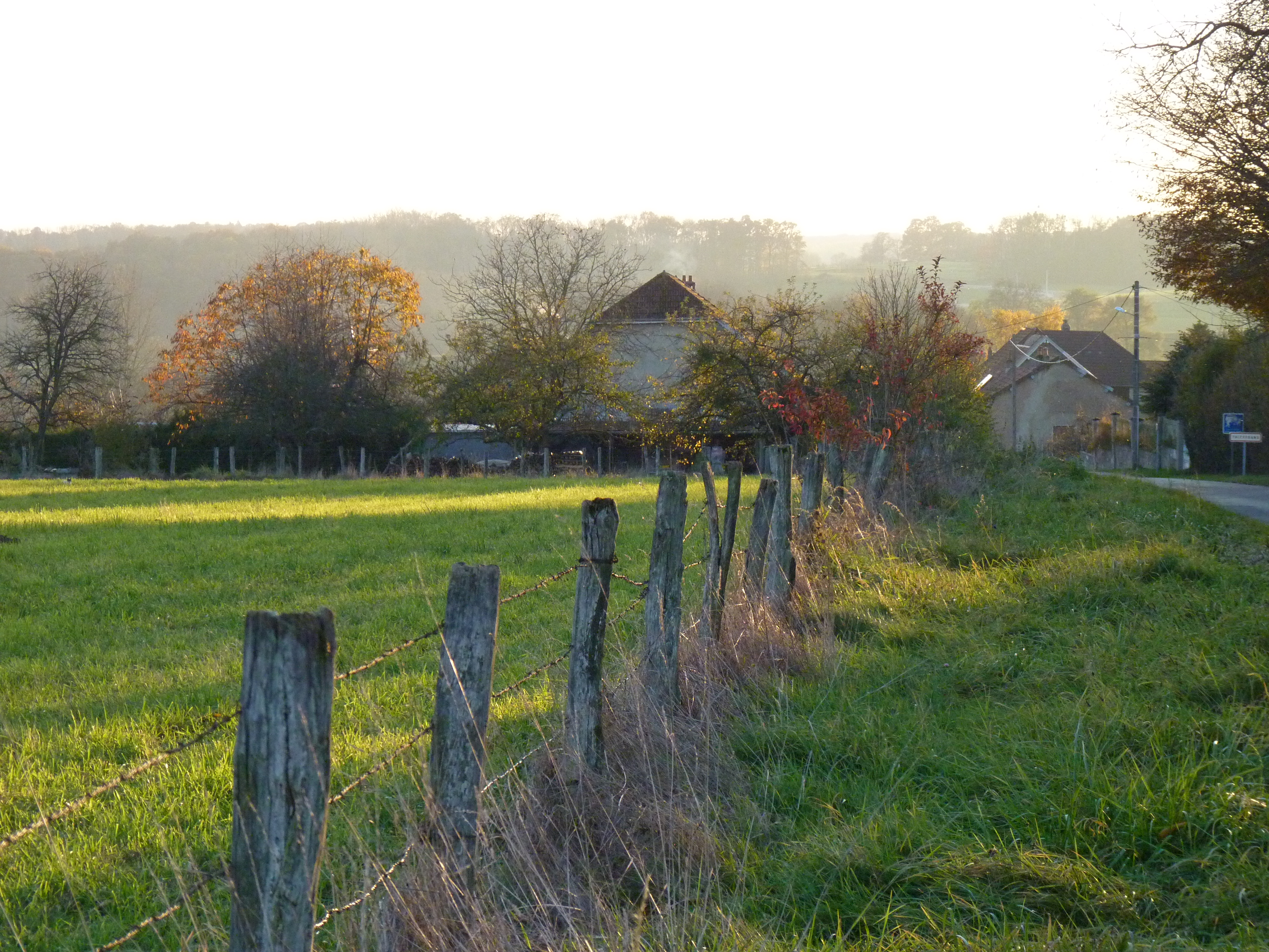 Thieffrans côté Nord, depuis la route de Chassey-les-Montbozon.